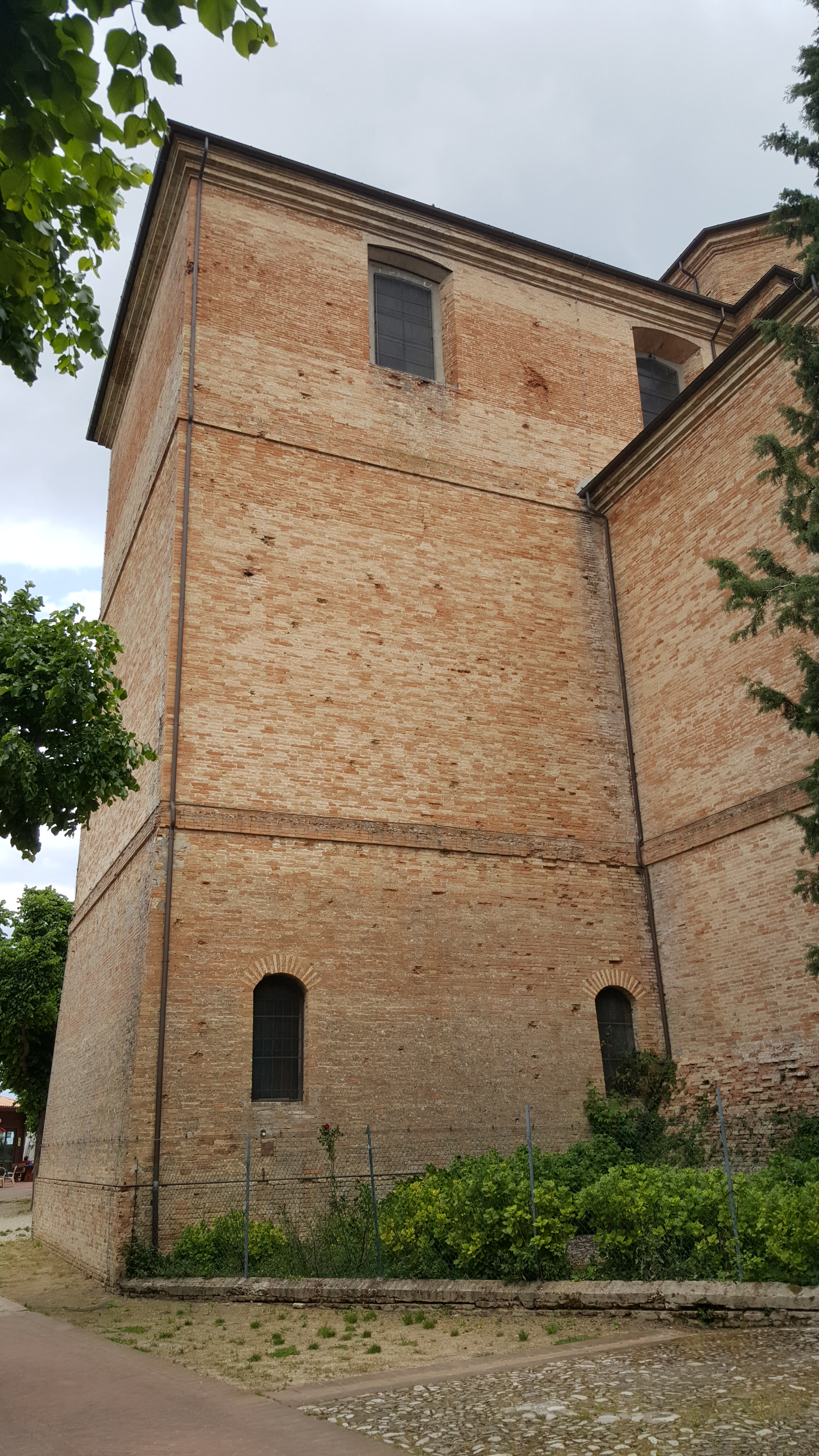 Museo di Saludecio e del Beato Amato This is a photo of a monument which is part of cultural heritage of Italy.